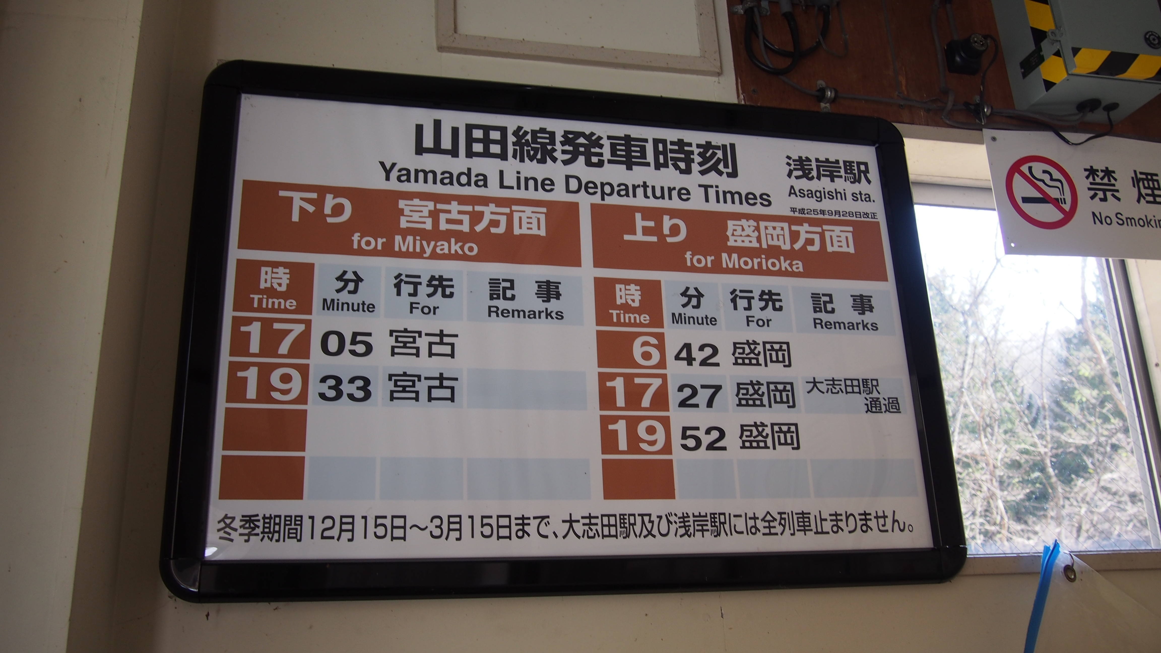 山田線 浅岸駅・時刻表